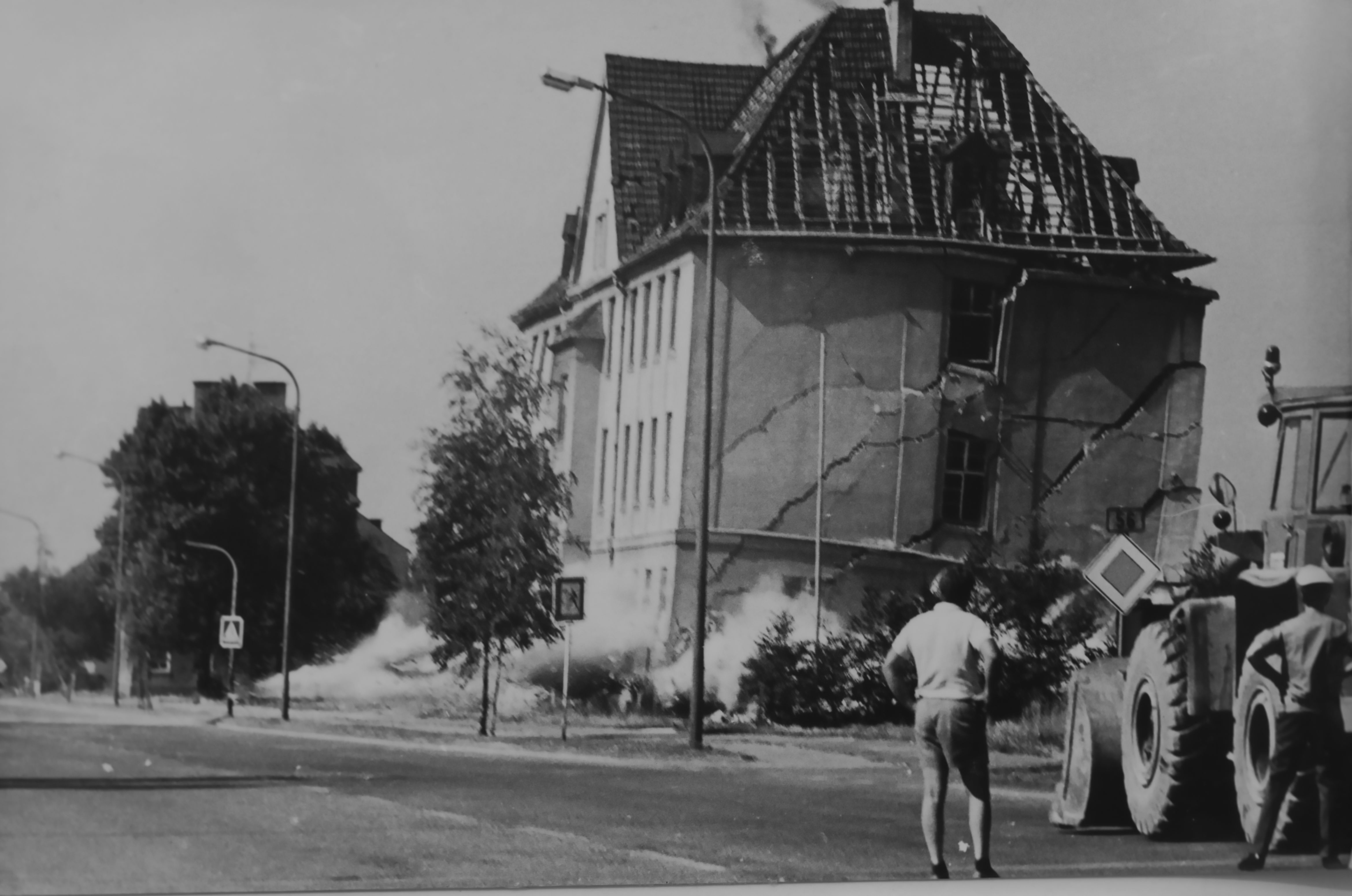 Sprengung eines Blocks der Riemannkasernen 1973